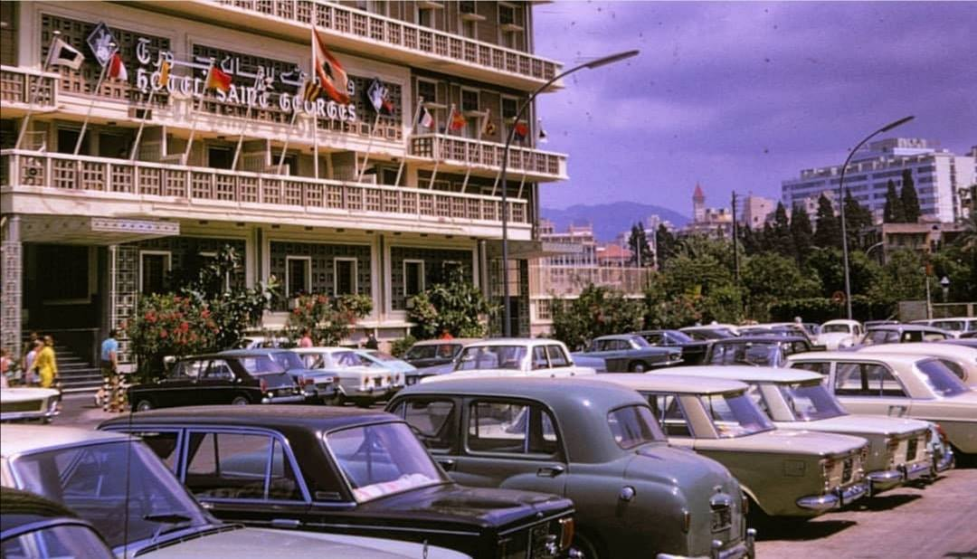 بيروت، فندق السان جورج ١٩٦٩